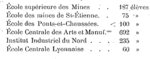 Effectifs des écoles délivrant un diplôme d'ingénieur en France en 1894 (Source : Annuaire de l'enseignement commercial et industriel ; Georges Paulet ; éditions Berger-Lavrault, Paris 1894